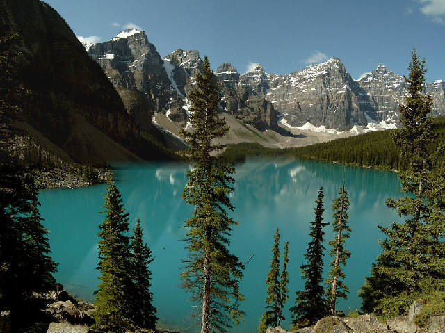 Moraine Lake, Banff National Park, Alberta, Canada.